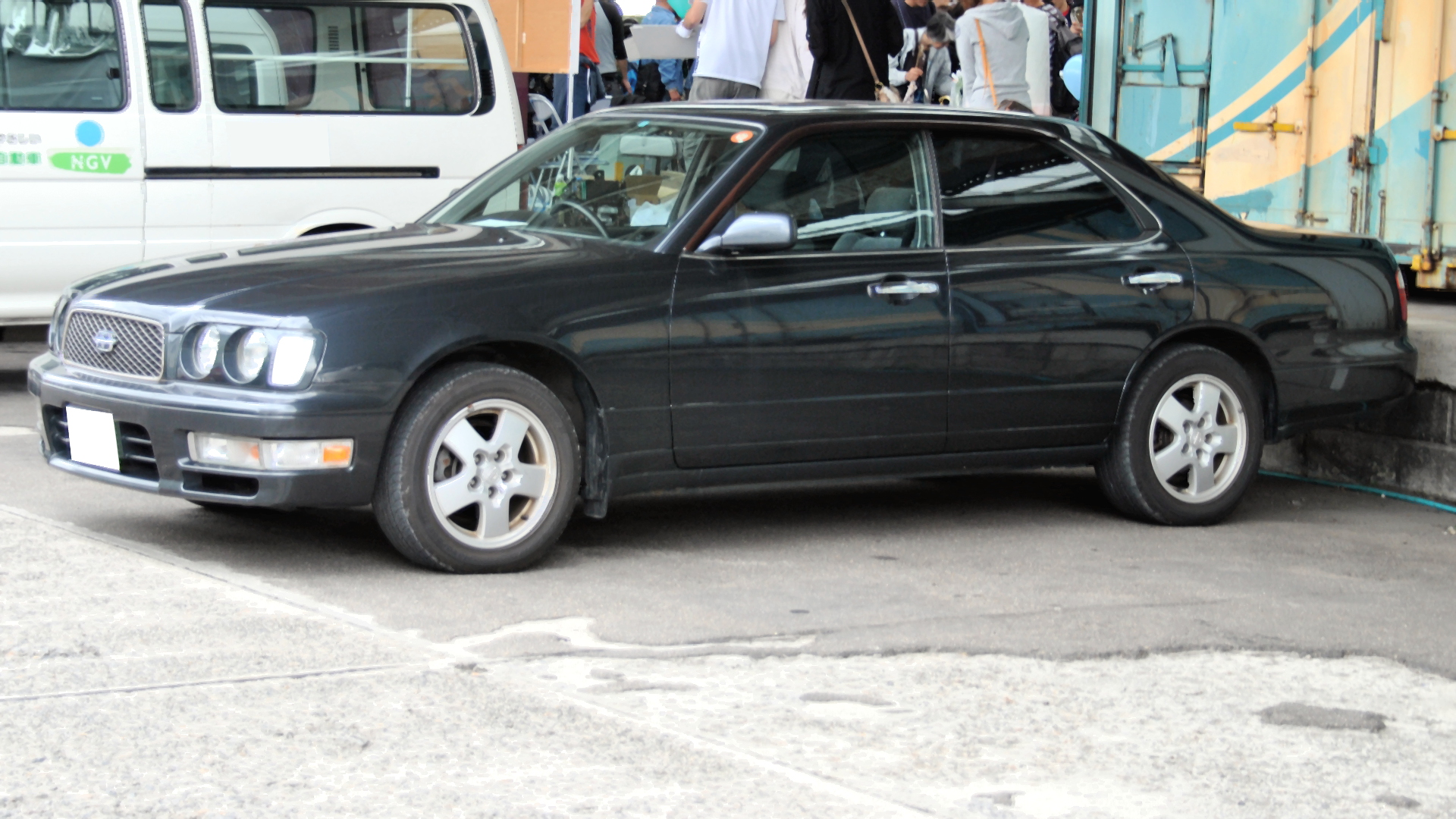 Y33型日産・グロリア（グランツーリスモ）